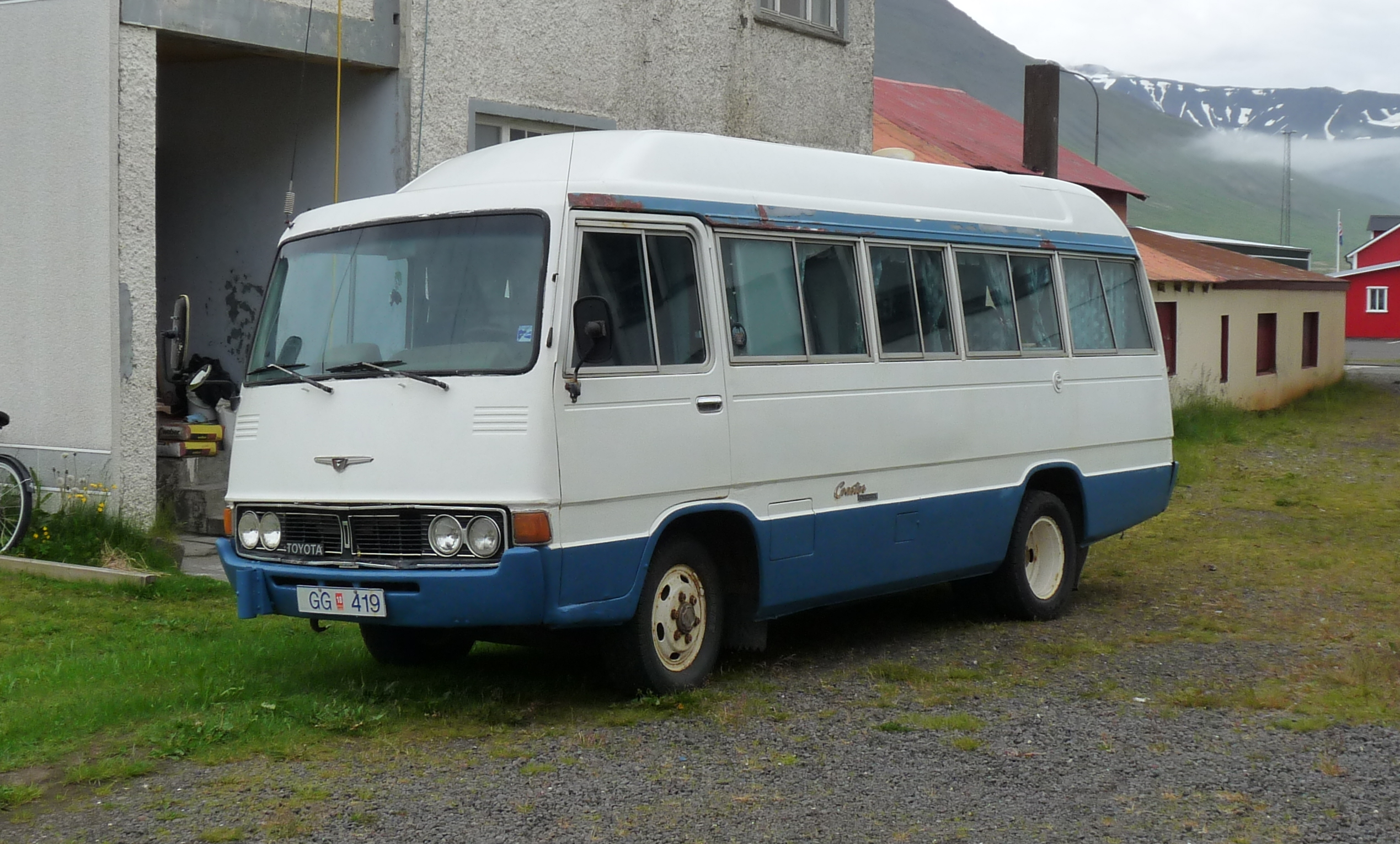 Siglufjörður